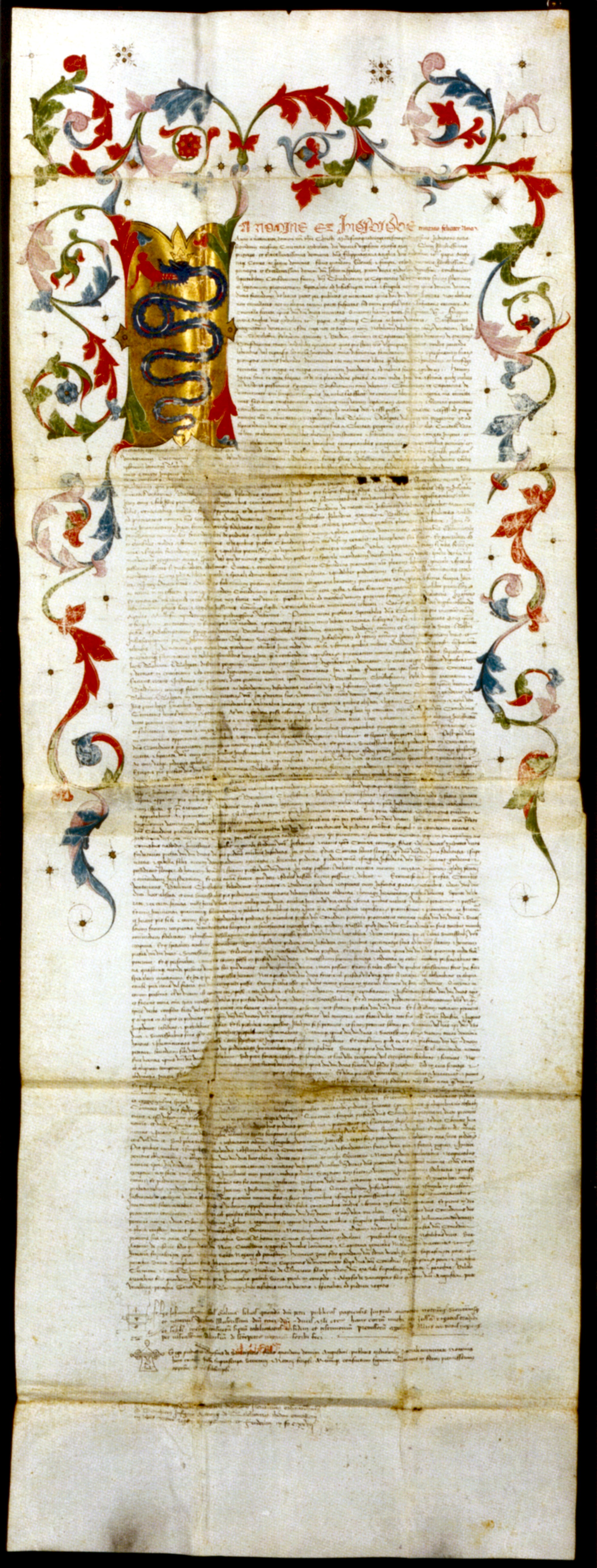 Belehnungsurkunde der Marenzi von 1440 von Herzog Filippo Maria Visconti von Mailand